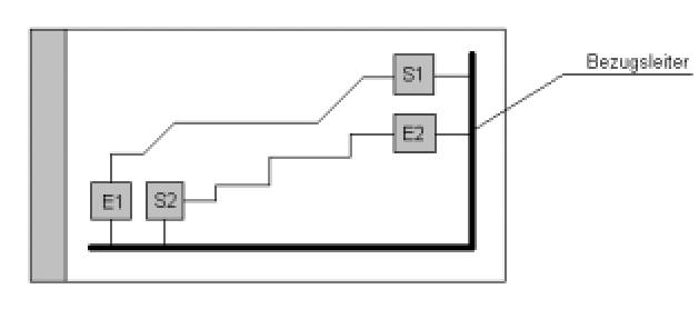 Beispiel einer galvanischen Kopplung